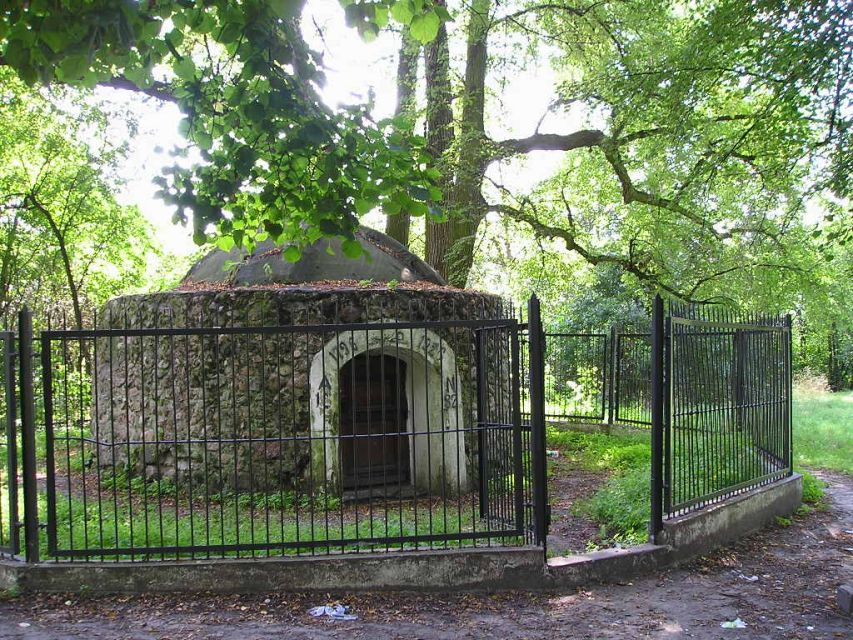 Janów Podlaski - Grota Adama Naruszewicza